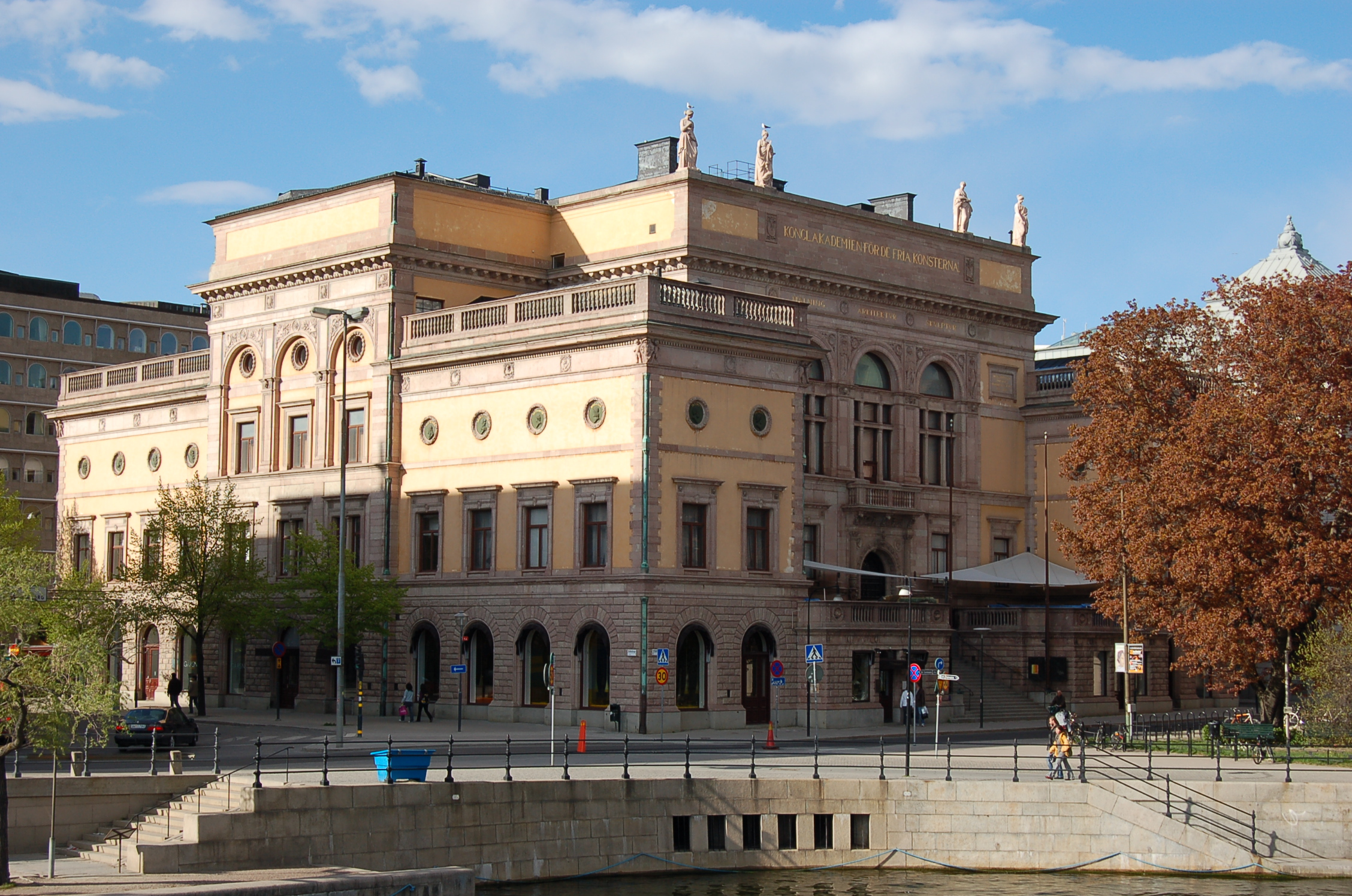 Kungliga Akademien för de fria konsterna på Fredsgatan i Stockholm. Ursprunglig byggnad från 1672; arkitekt Nicodemus Tessin d.ä. På- och ombygd 1847; arkitekt Fredrik Blom. På- och ombygd 1896; arkitekt Erik Lallerstedt.